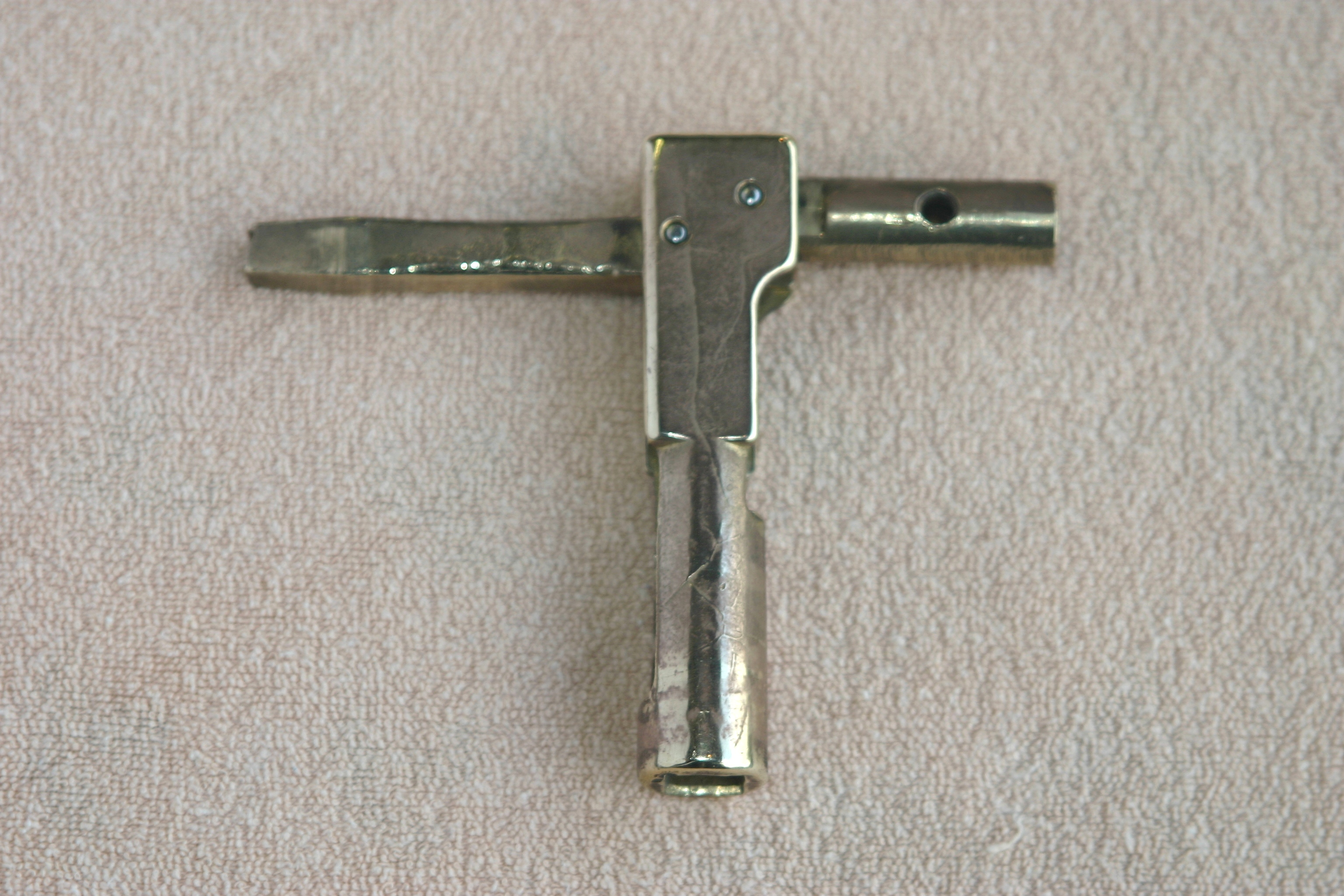 Combischlëssel vun der SNCB opgeklappt.